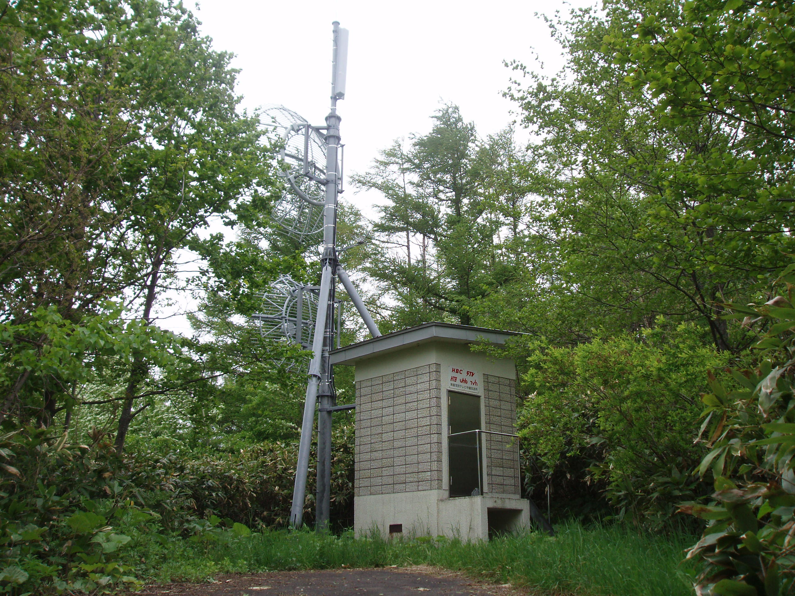 南喜茂別中継局 HBC・STV・HTB・UHB・TVh送信設備